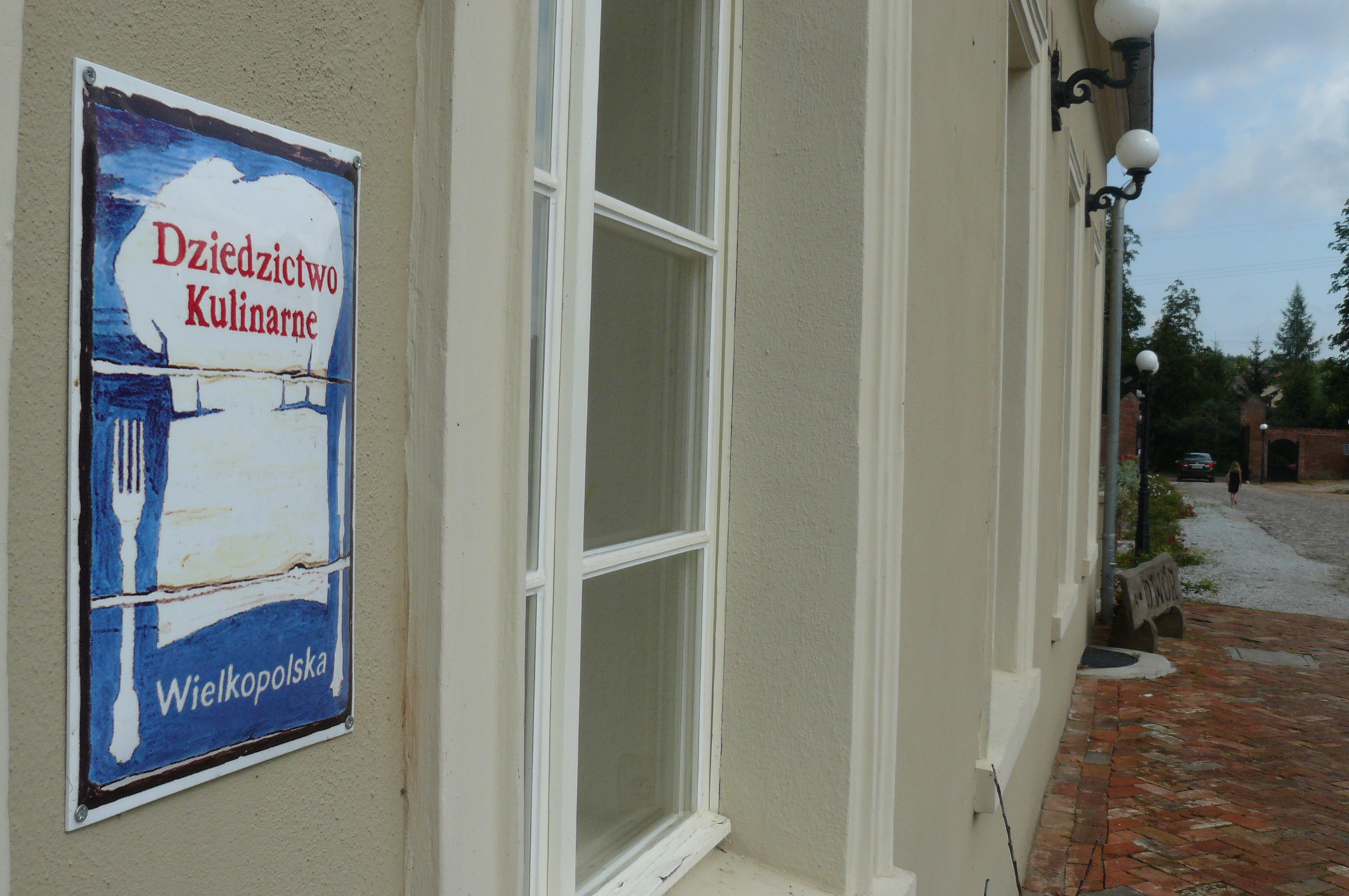 Tabliczka "Dziedzictwa kulinarnego" - Prusim ("Olandia").